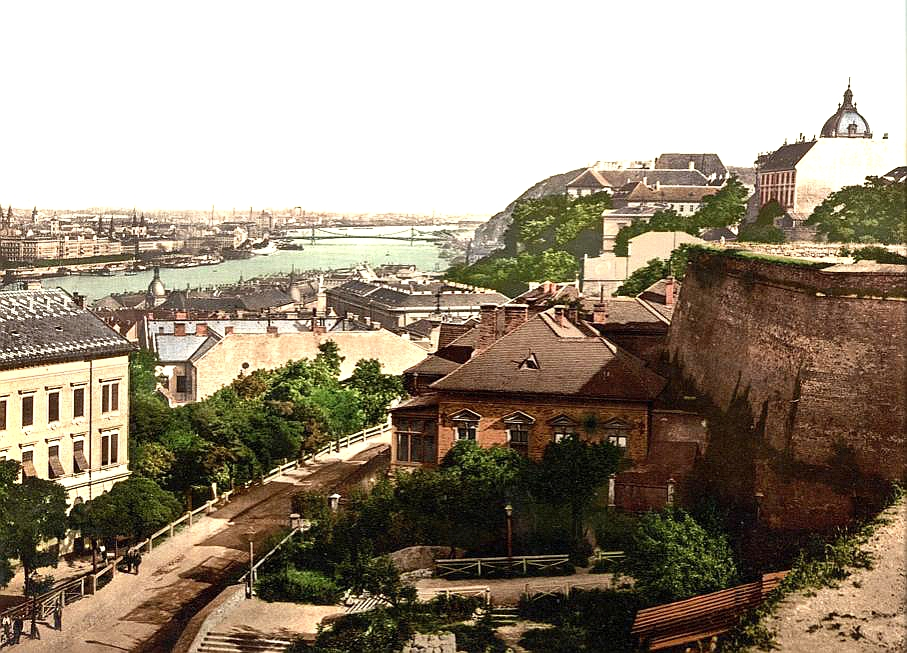 Budapesti látkép 1900-ból jobbra a régi Halászbástya